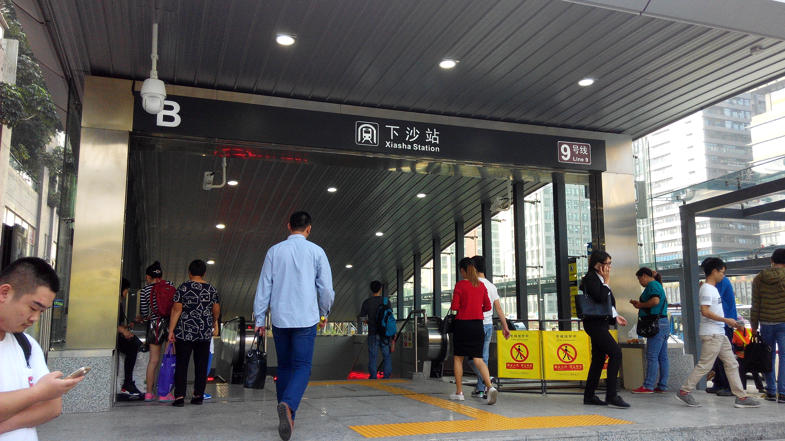 深圳地铁9号线 下沙站B出口